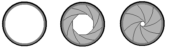 Schéma du diaphragme d'un objectif photographique à 3 ouvertures. Illustration personnelle - libre de droits Catégorie:Image d'objectif photographique